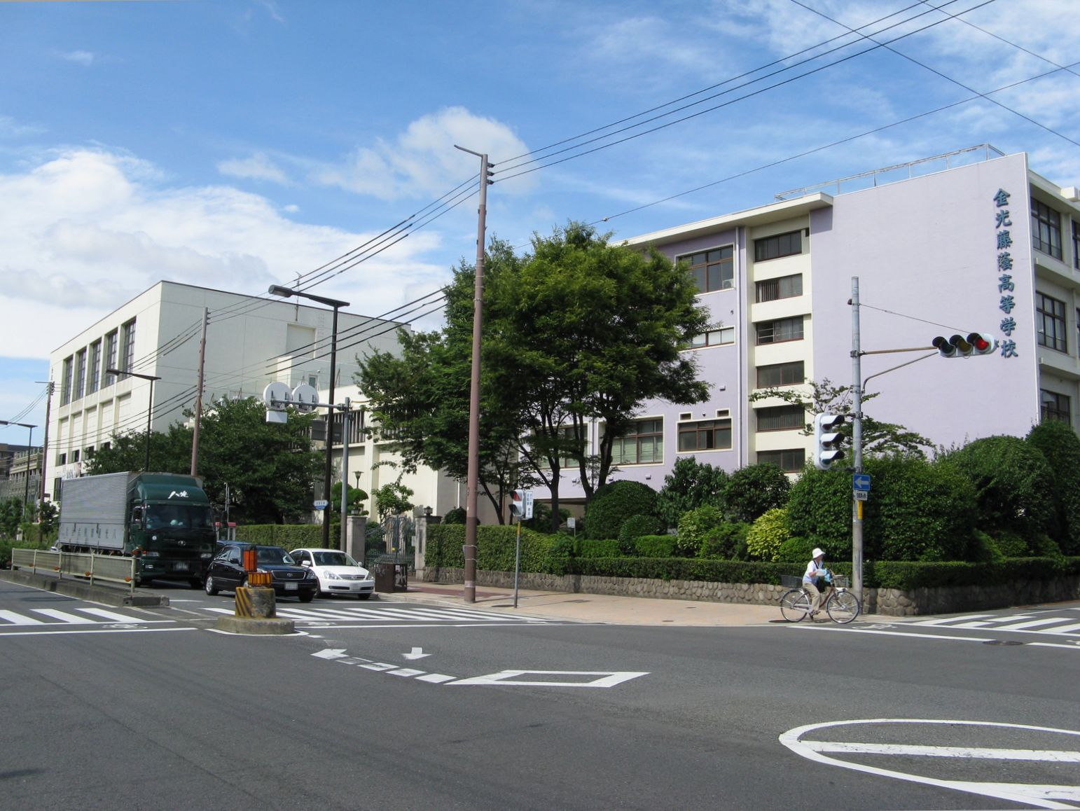 金光藤蔭高等学校